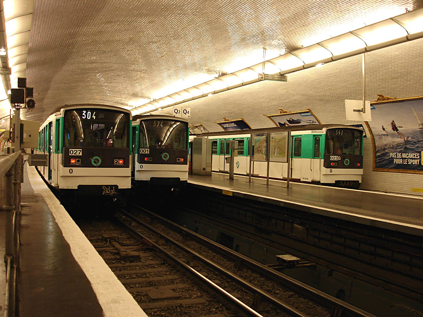 Station Pont de Levallois - Bécon, de la ligne 3 du métro de Paris, France.